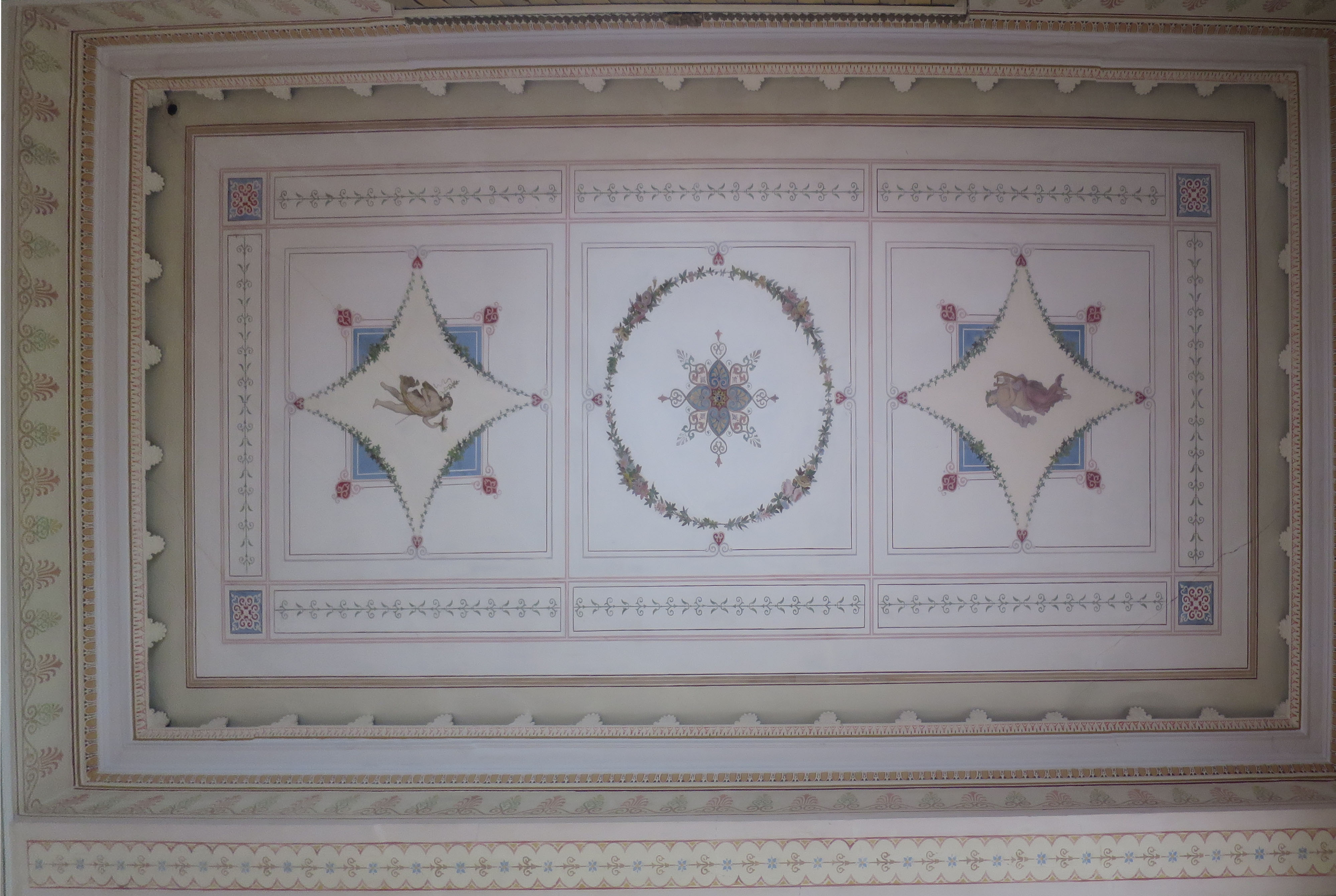 Bamalte Decke in der Villa Denis, Diemerstein